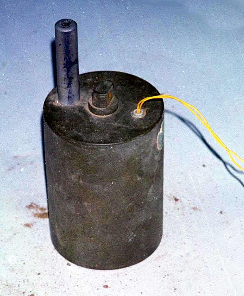 Sowiecka mina przeciwpiechotna OZM-3